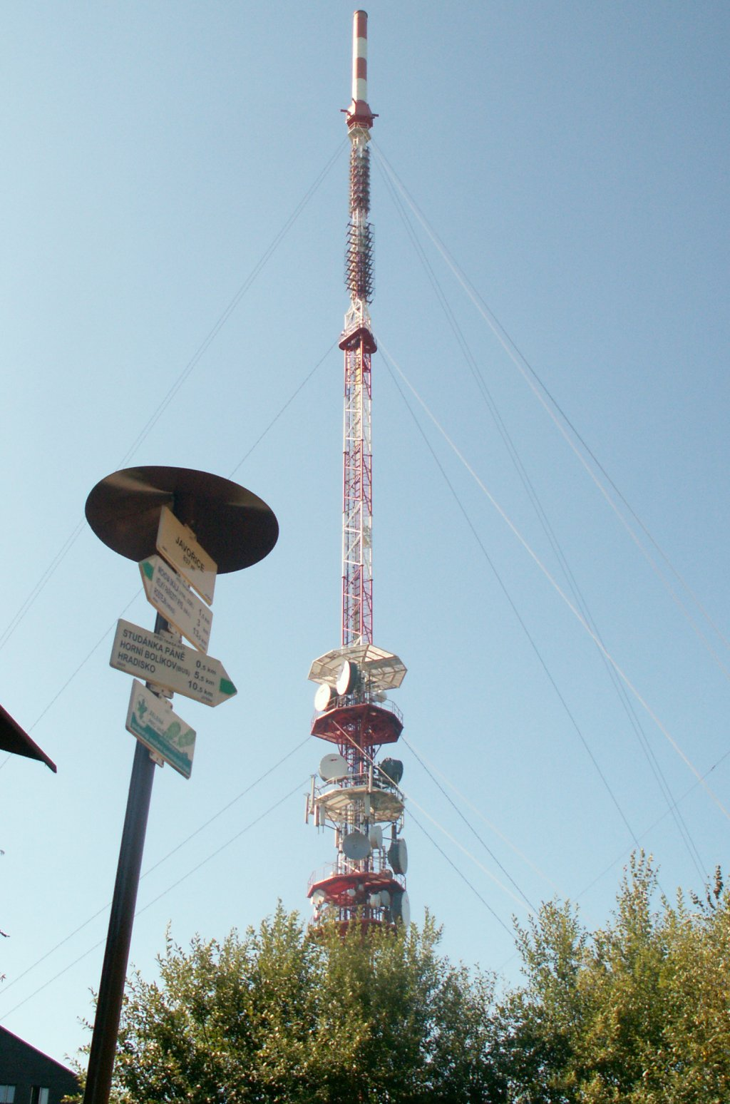 Javořice - rozcestník, 2006